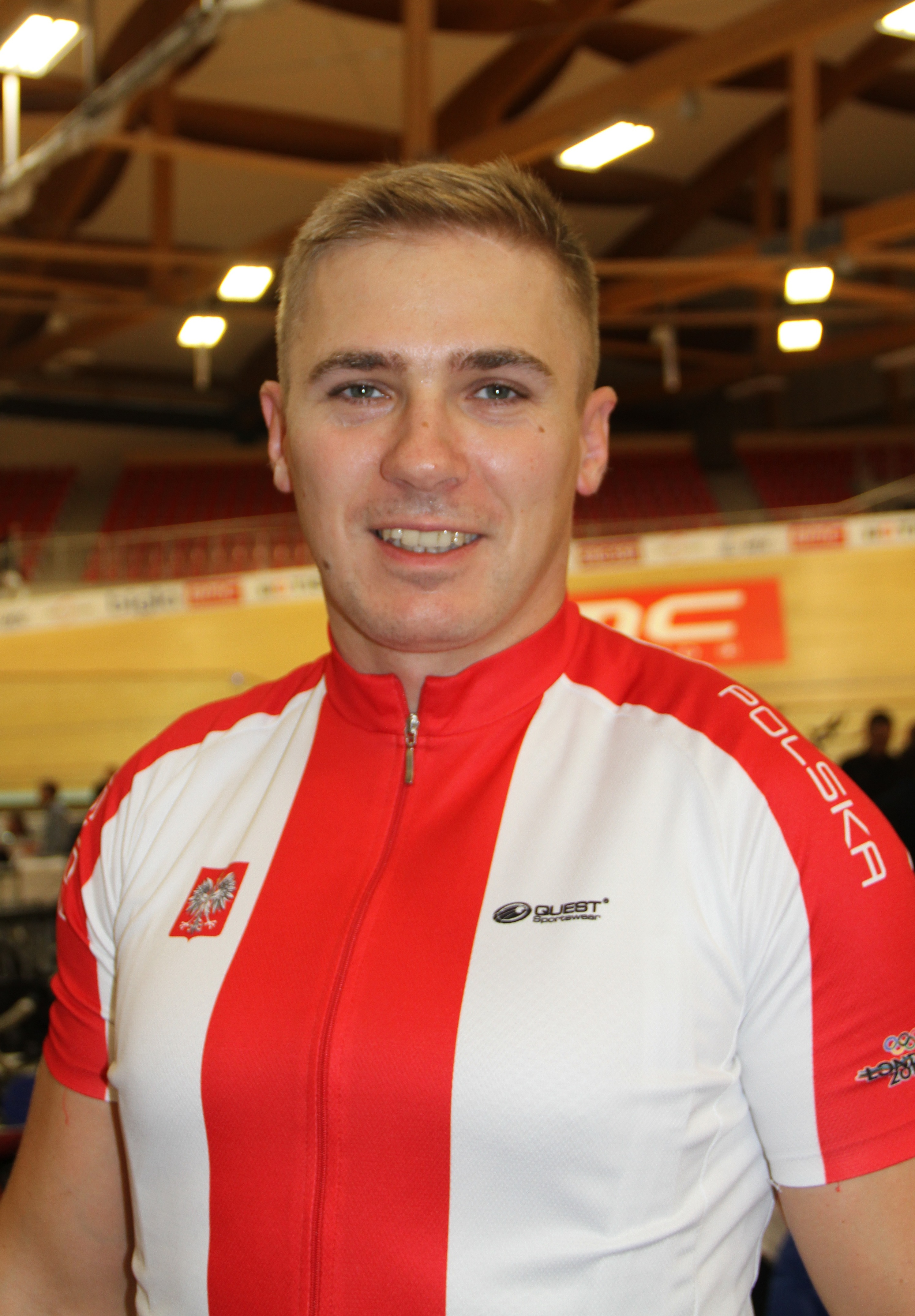 The making of this document was supported by the Community-Budget of Wikimedia Germany.